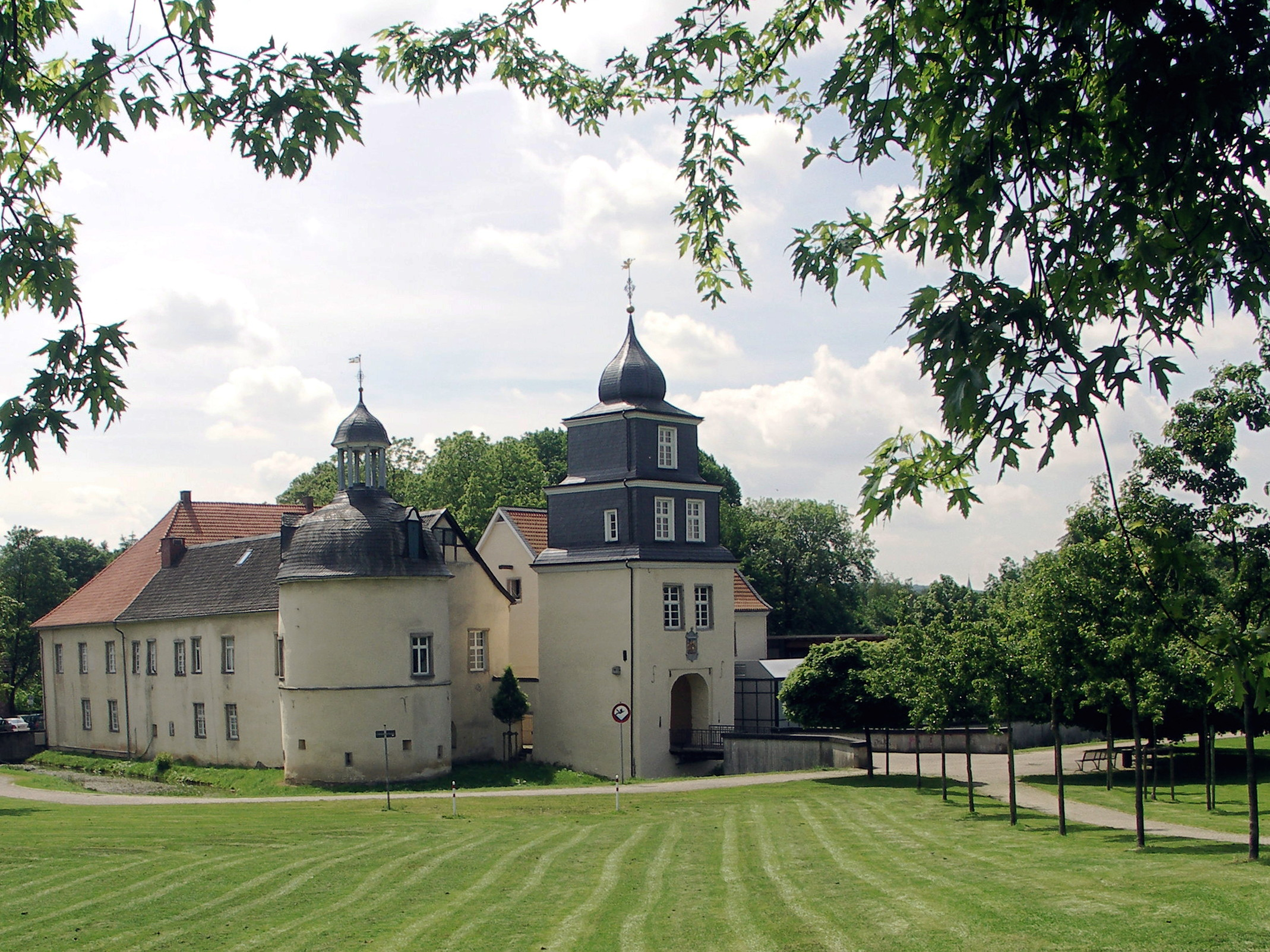 ehemaliges Wasserschloss Haus Martfeld in Schwelm